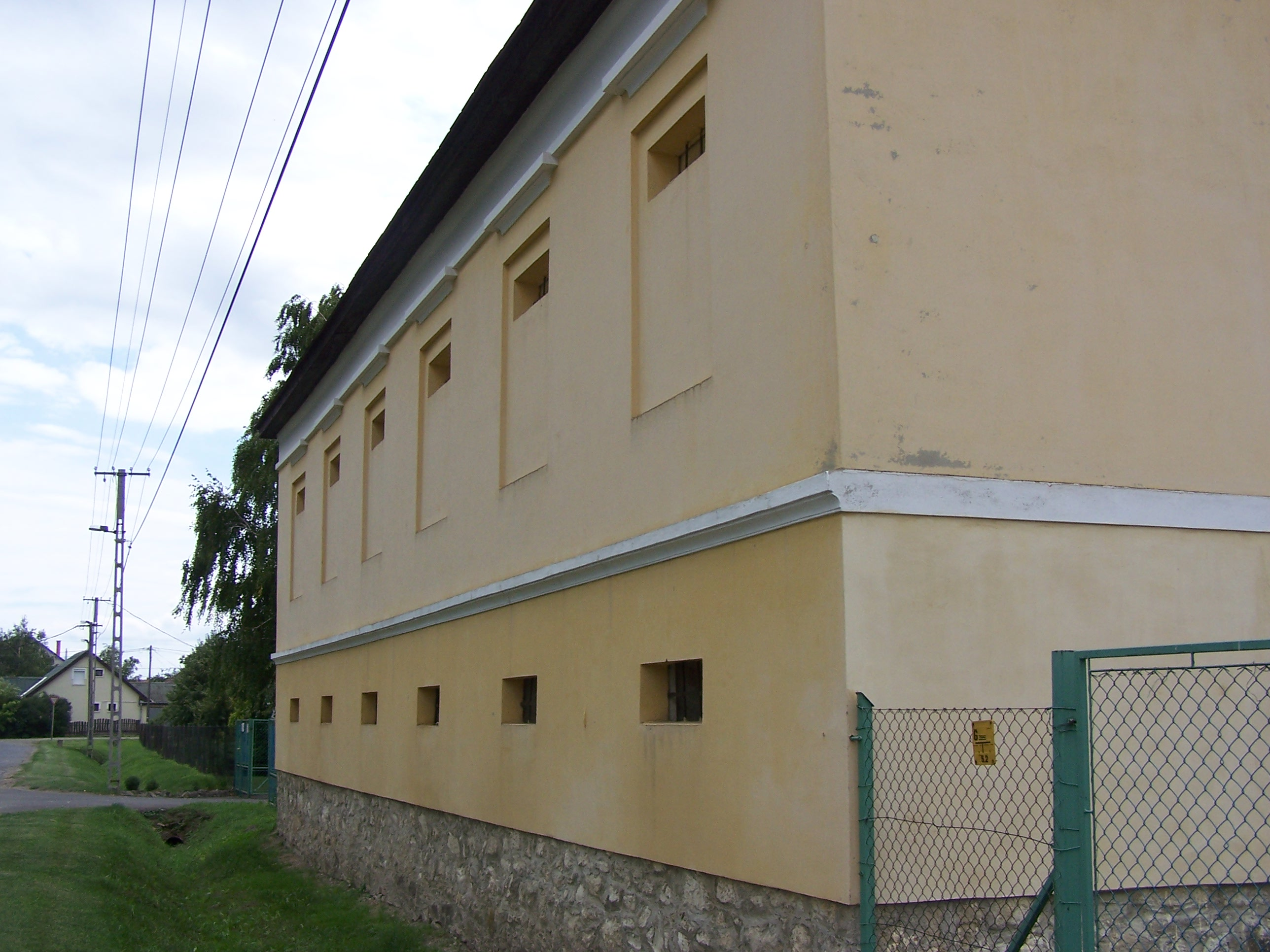 Magtár (Egyházasdengeleg, Sport út 39.) This is a photo of a monument in Hungary. Identifier: 6580